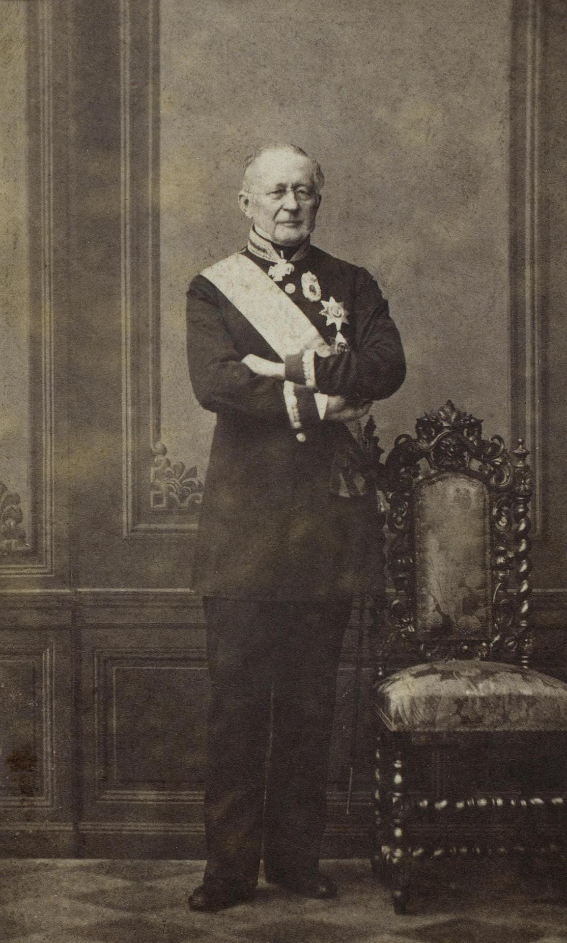 Портрет князя Александра Михайловича Горчакова. Фотография: альбуминовый отпечаток. 10,8х6,2 см